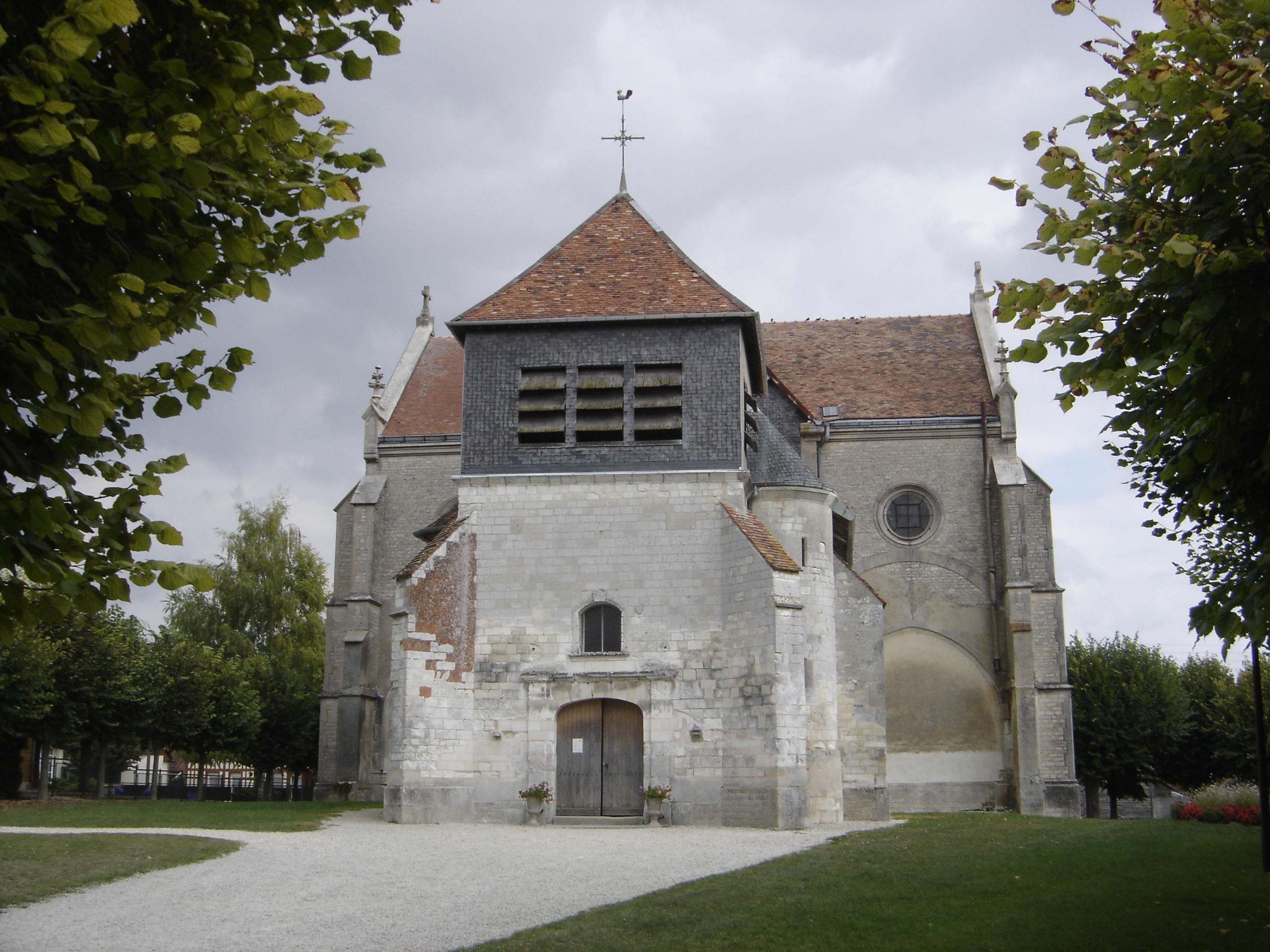 église paroissiale de Piney (Aube - Champagne - France)